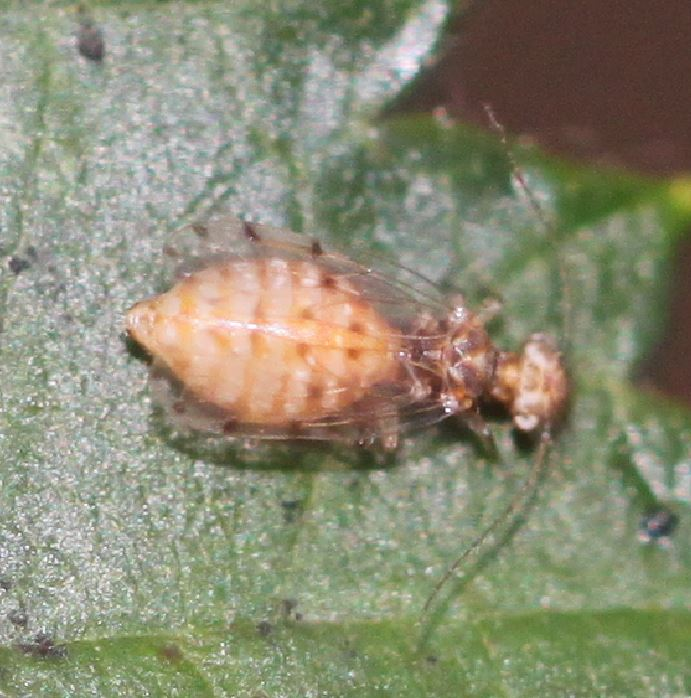 Baumlaus der Gattung Ectopsocus am 28.9.2016 in der Schwetzinger Hardt